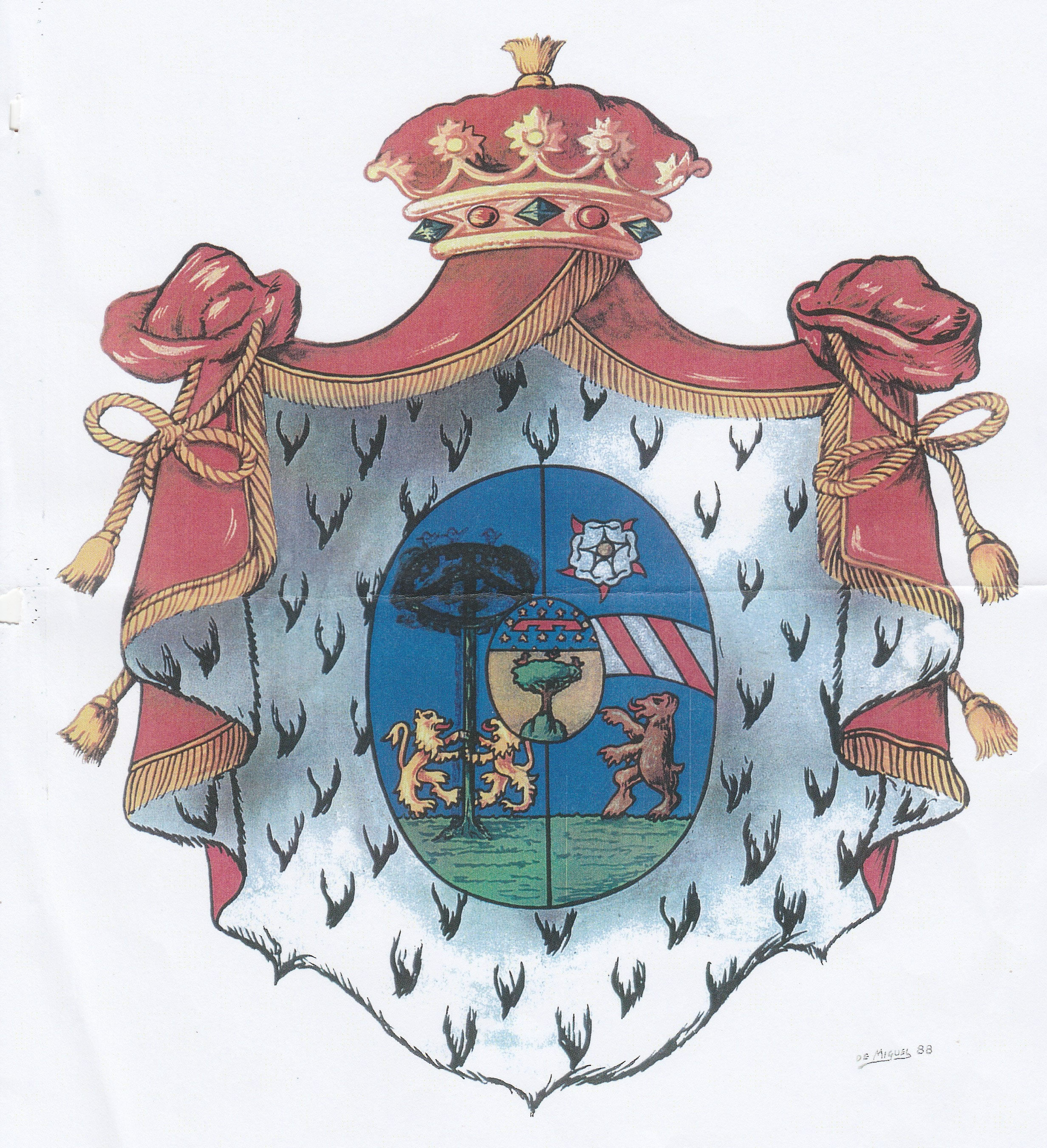 Stemma Feudale Famiglia Majo poi Majo Orsini riconosciuto dal Regno di Spagna con decreto reale del Ministero di Giustizia datato 1988